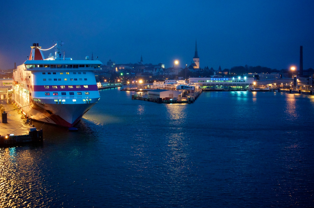 Morning in Tallinn Harbor